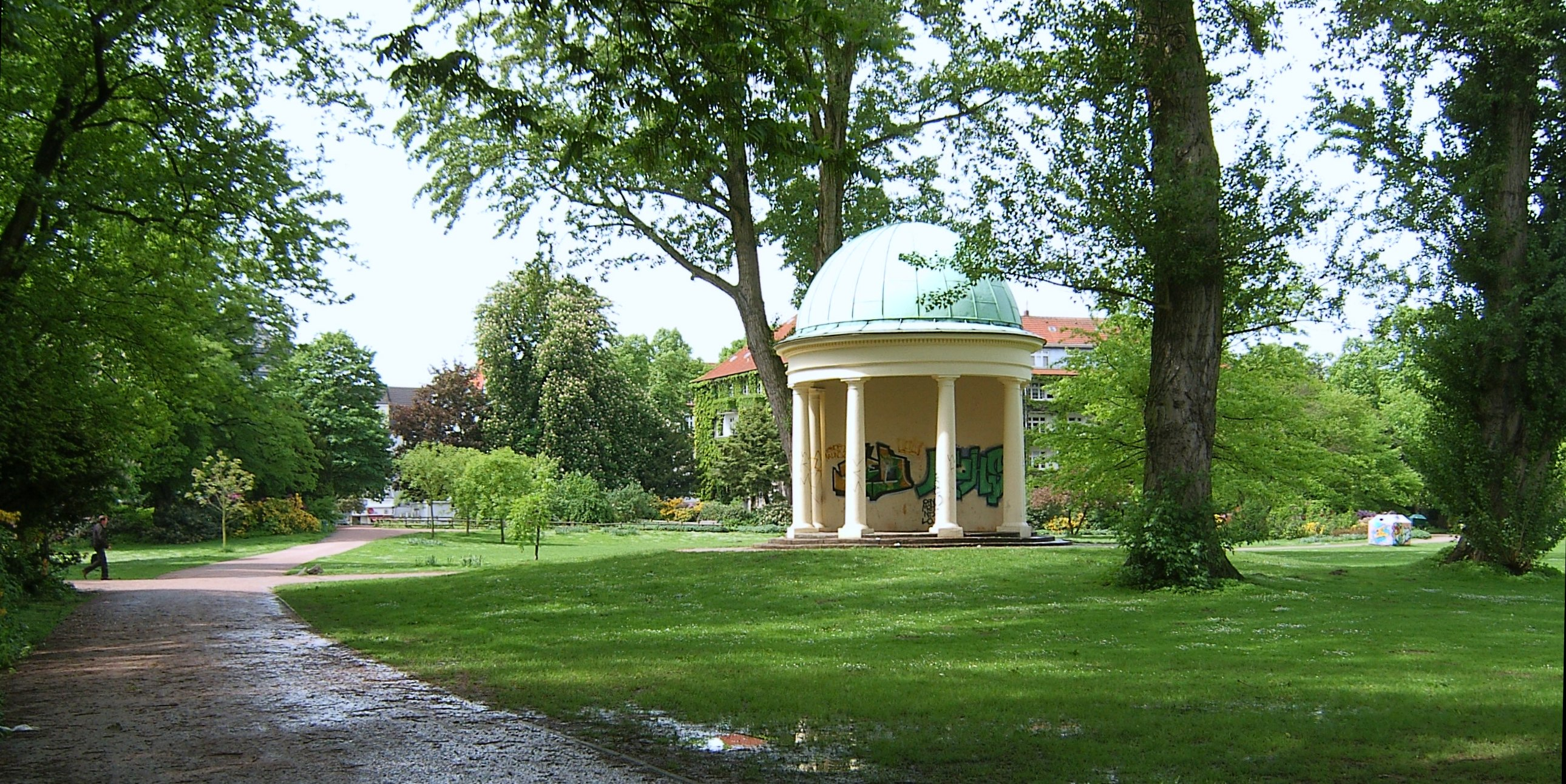 Hamburg, Eppendorf, Heyns Park